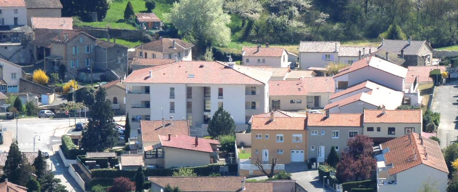 Sarras vue partielle